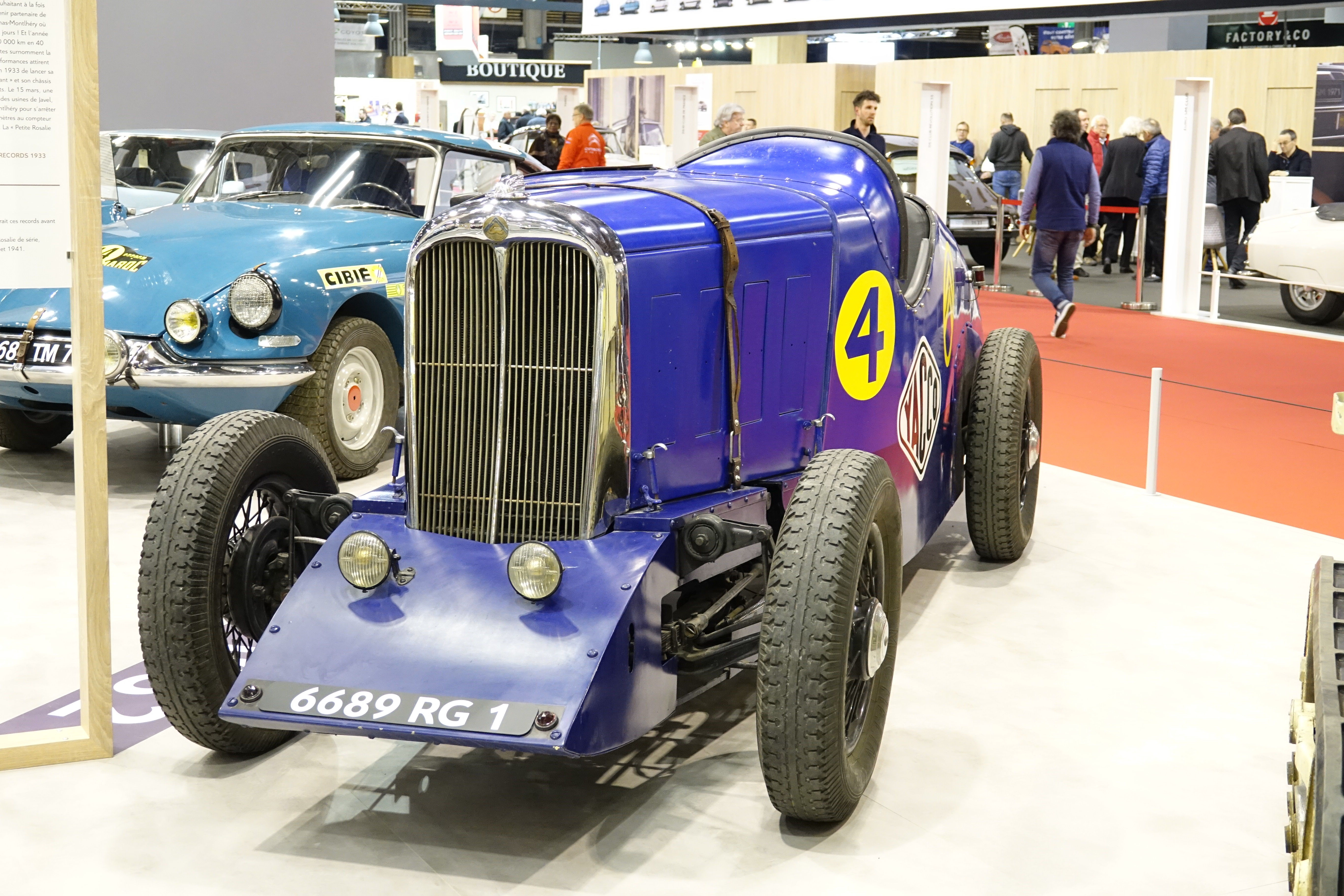 Exposition 100 ans de Citroen - Rétromobile 2019